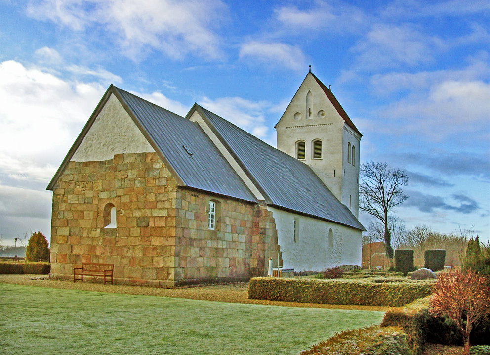 Bølling - Ringkøbing-Skjern fra nordøst